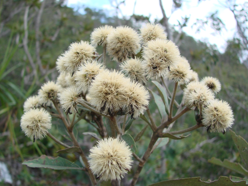 Eremanthus glomeratus - ASTERACEAE Chapada Imperial - Brasília - Distrito Federal - Brasil.